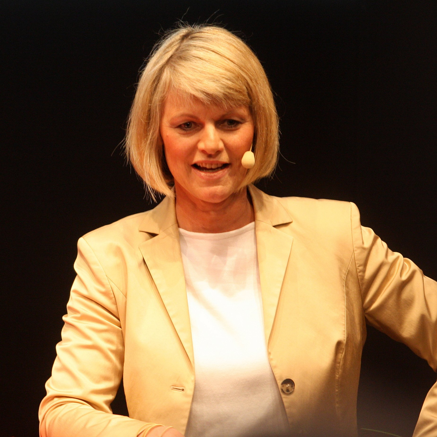 Gundula Gause, deutsche Nachrichtenmoderatorin im ZDF. Hier während der Eröffnungsveranstaltung der transport logistic 2015 (15. Internationale Fachmesse für Logistik, Mobilität, IT und Supply Chain Management, ihre Services und Produkte) in München